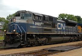 locomotora de CN